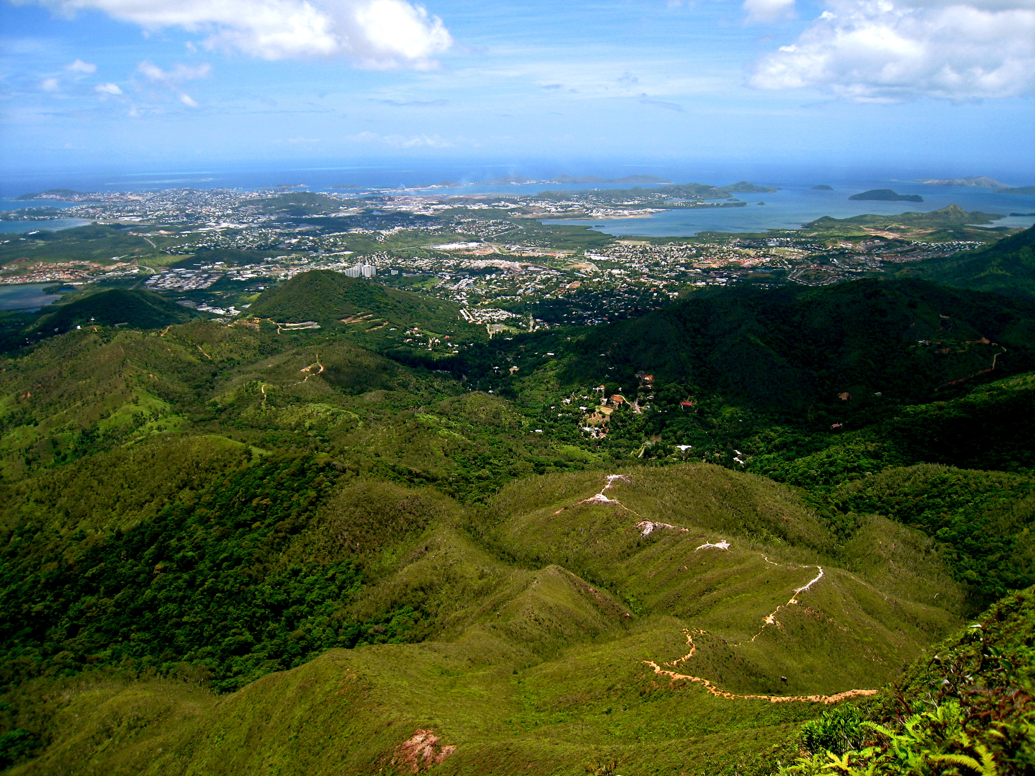 Monts-Koghis - Pic Malaoui (687 m) - Vue sur Nouméa